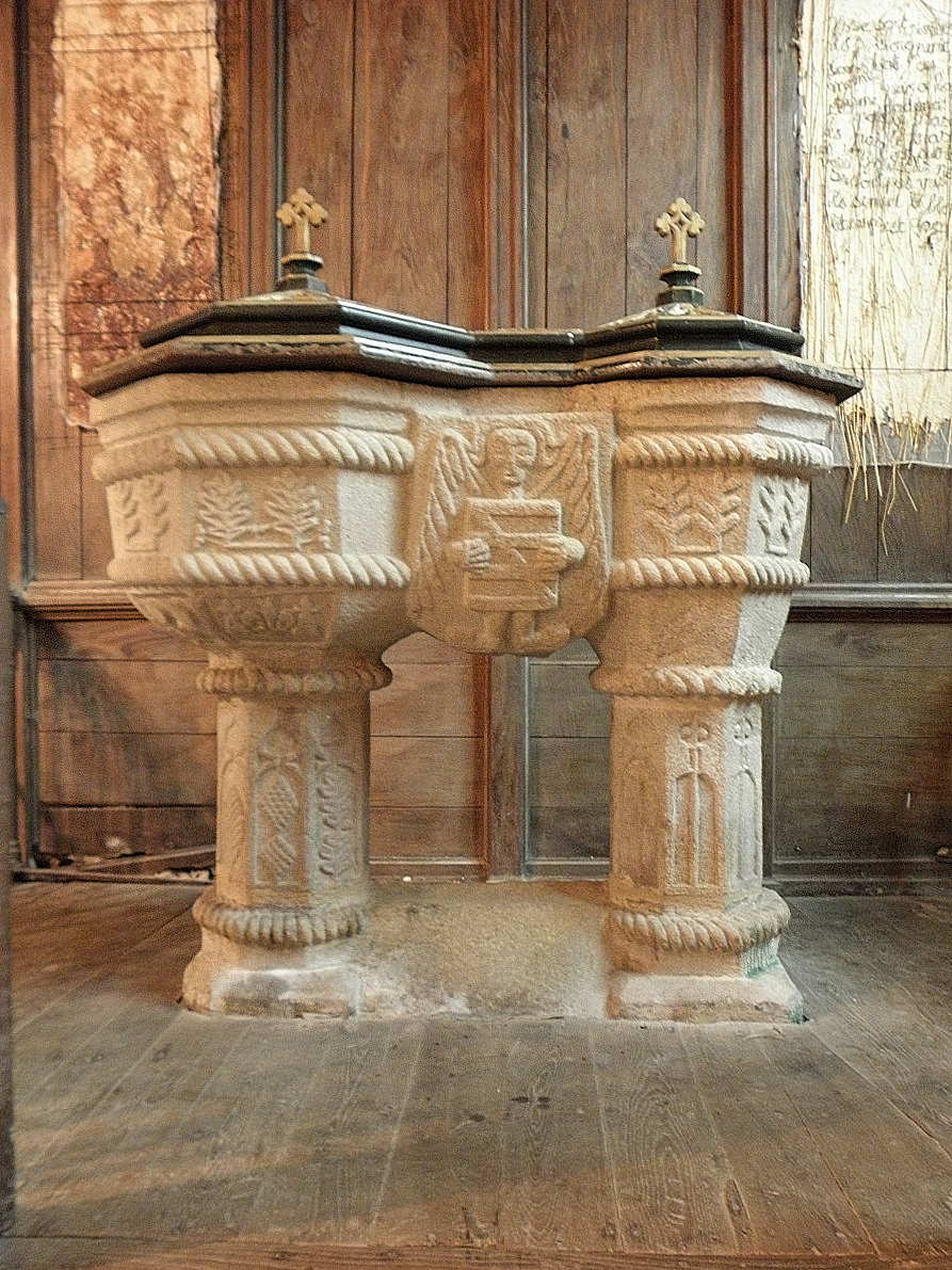 Fonts baptismaux géminés du XIVe siècle de l'église Saint-Léon de La Baussaine (35) classés MH en 1911.